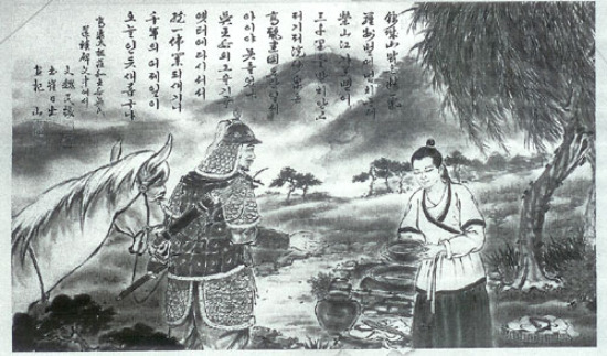 고려태조 왕건과 그의 두번째 부인 장화왕후 오씨